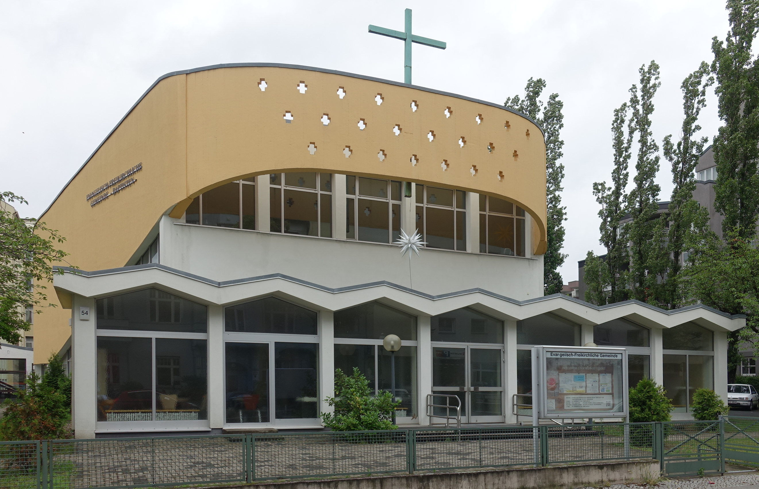 Portal de Kirche